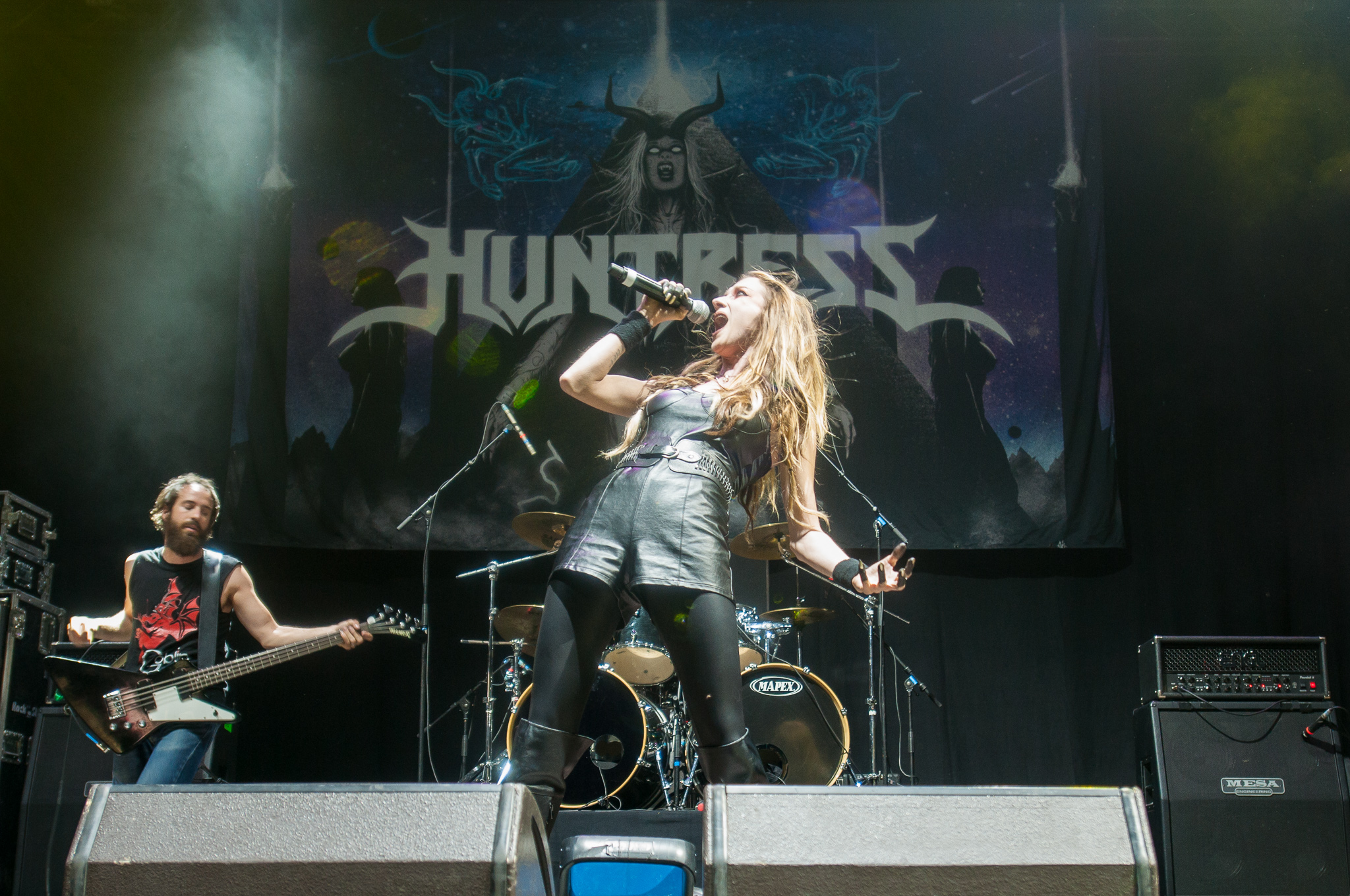 ARGO-Konzerte,Arena Nürnberger Versicherungen,Clubstage,Huntress,Ian Alden,Jill Janus,Konzert,Livekonzert,Livemusik,Musik,RiP,Rock im Park 2014